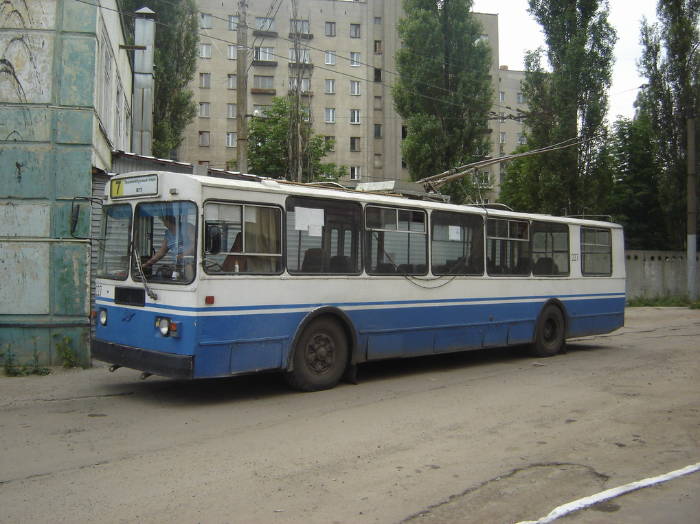 Троллейбус готовится к выходу на маршрут